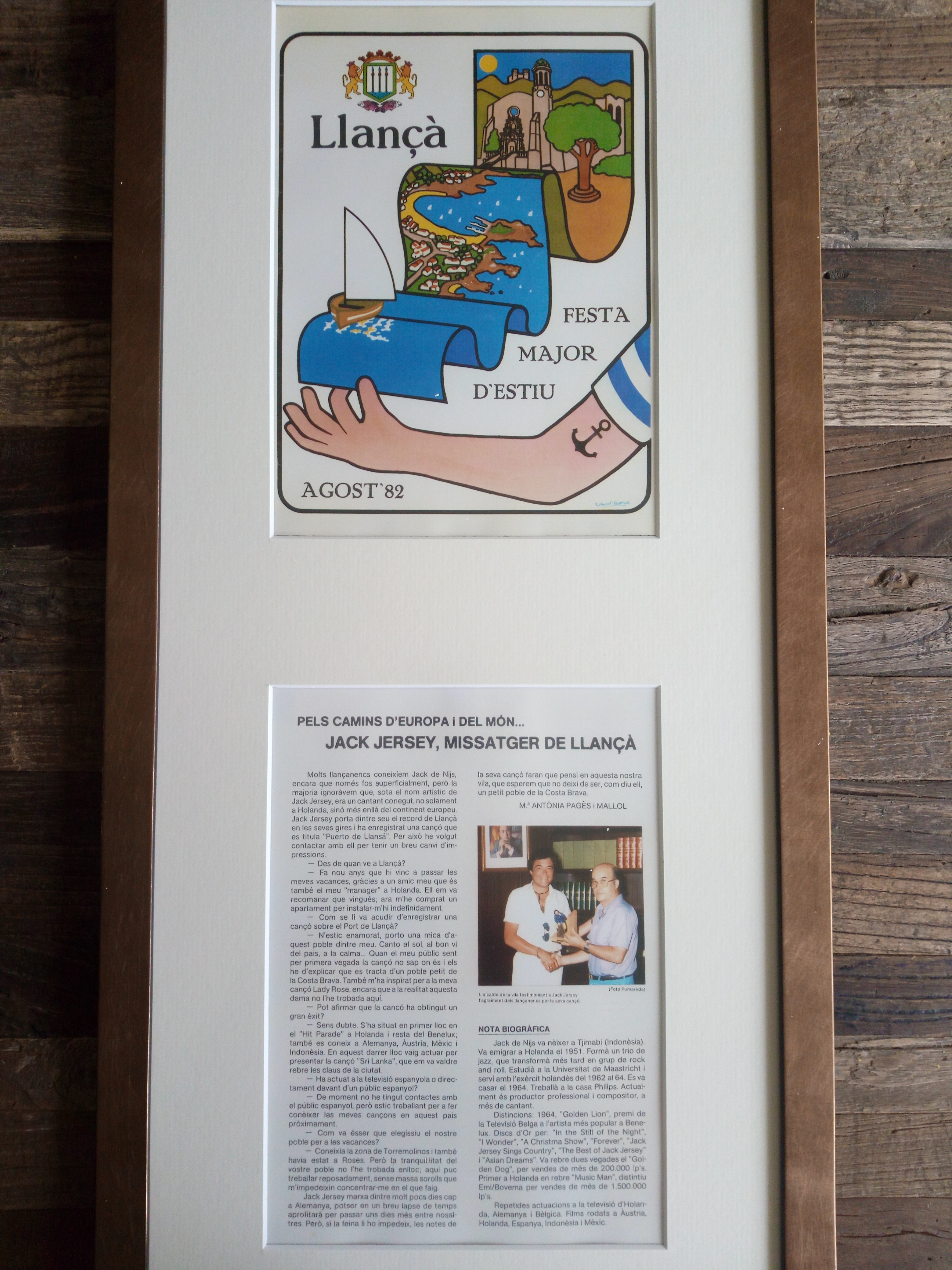 Jack Jersey, Missatger de LlançaJack Jersey, oorkonde waarmee hij door de stad Llança wordt geëerd